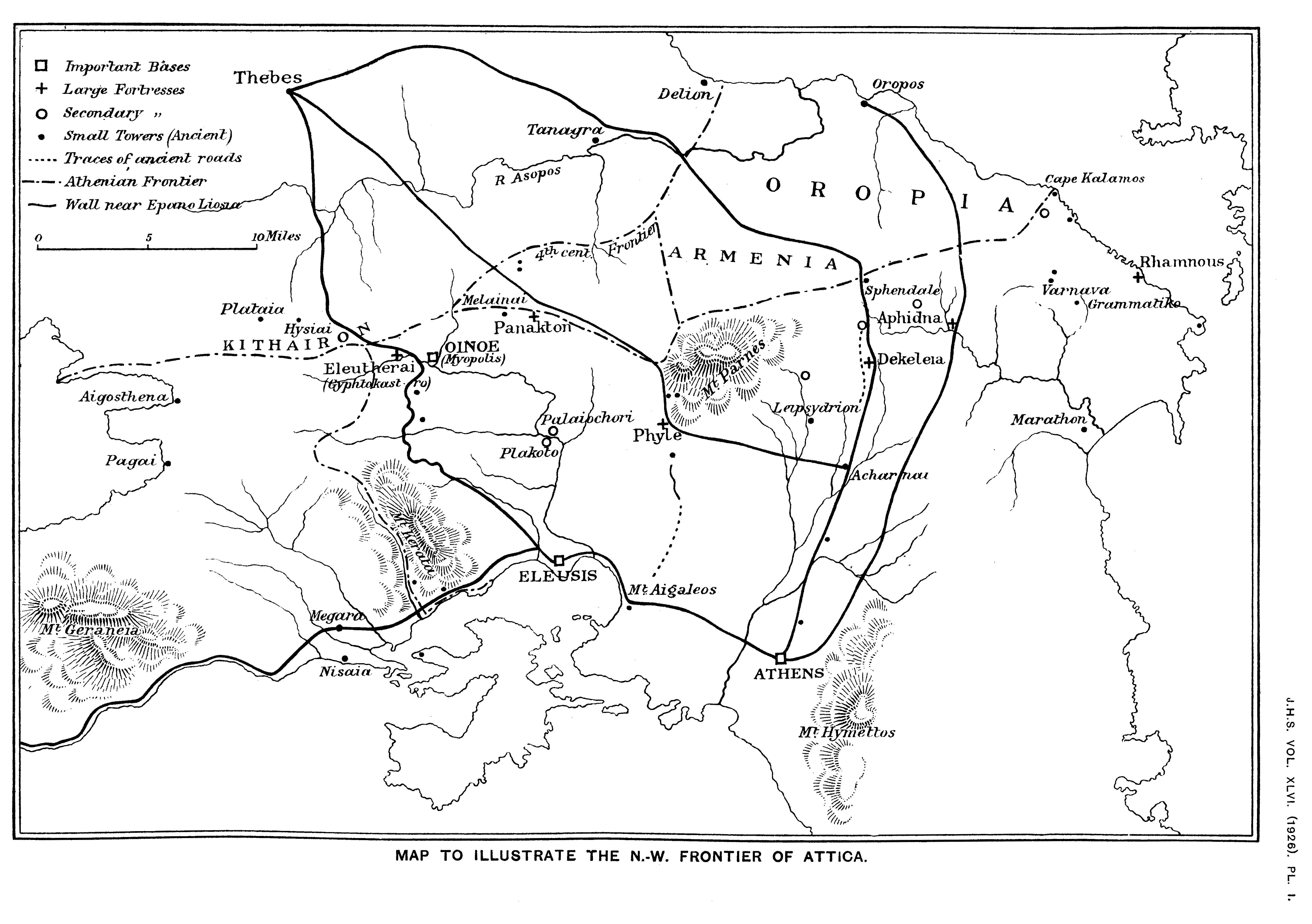 Karte „The N.-W. Frontier of Attica“.